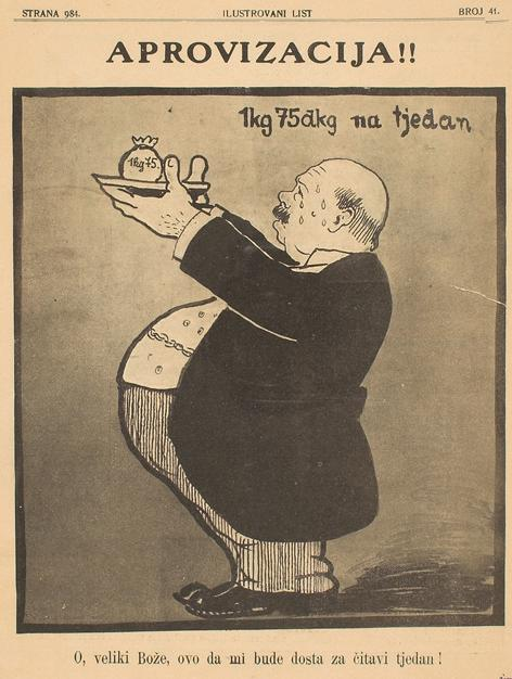 Ilustrovani list, 1915.